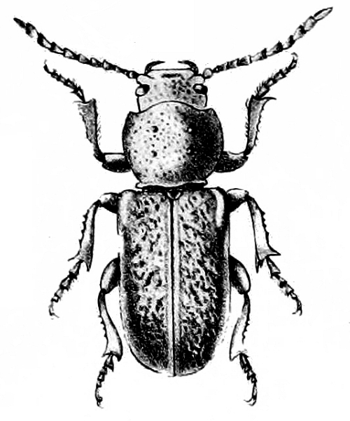 Migdolus fryanus (Anoplodermatinae)